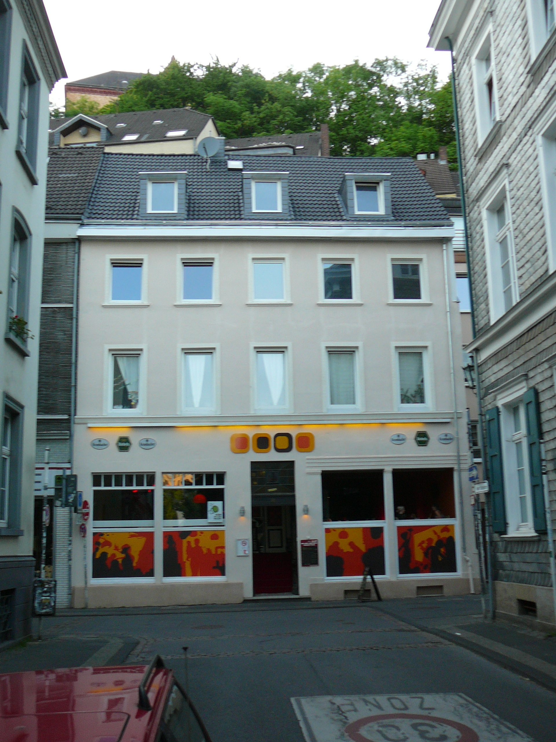 Luisenstraße 86This is a photograph of an architectural monument. 1008